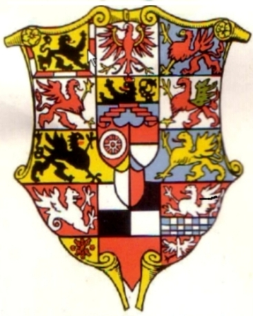 Das "Große Wappen" Kardinal Albrecht von Brandenburg 1490-1545, Kurfürst und Erzkanzler des Heiligen Römischen Reiches (15 teilig)